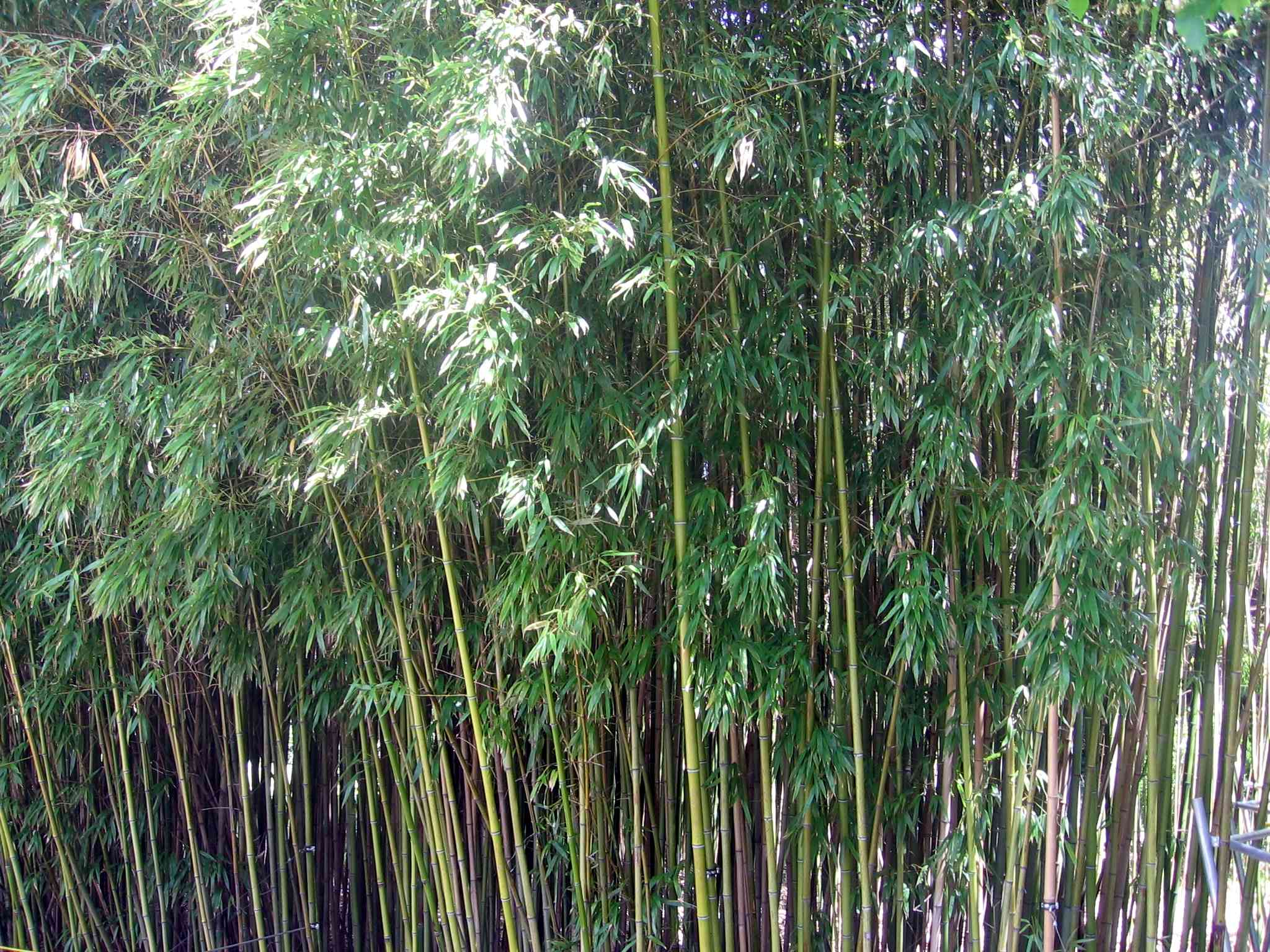 Bamboo